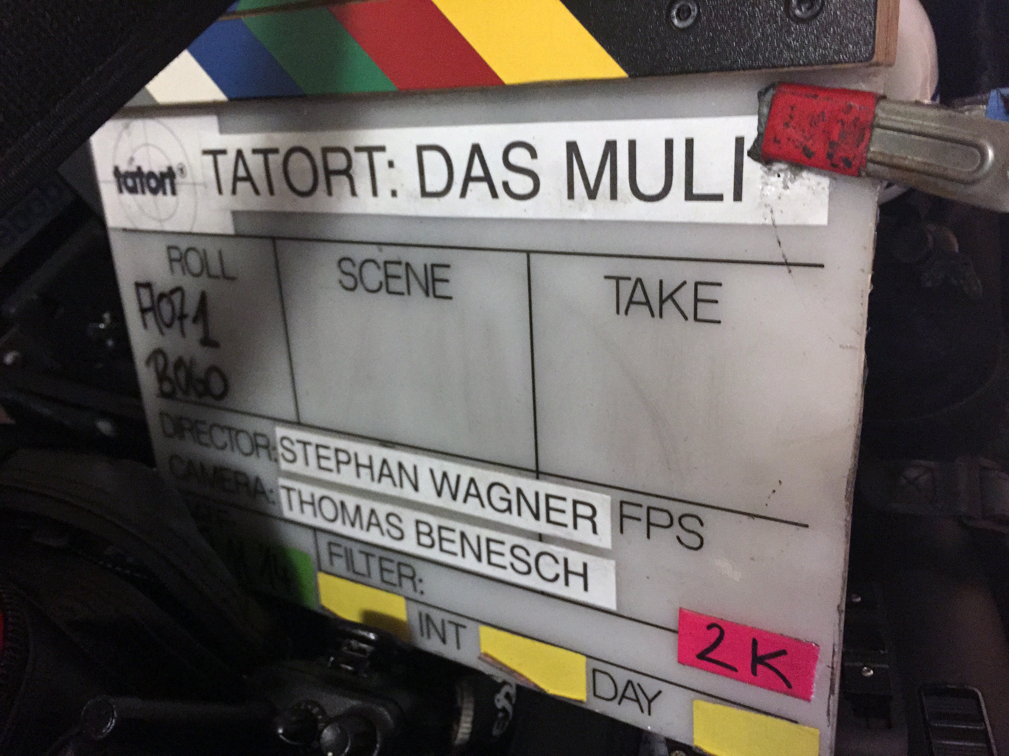 Bild vom Film dreh des "Tatort: Das Muli" für den RBB.